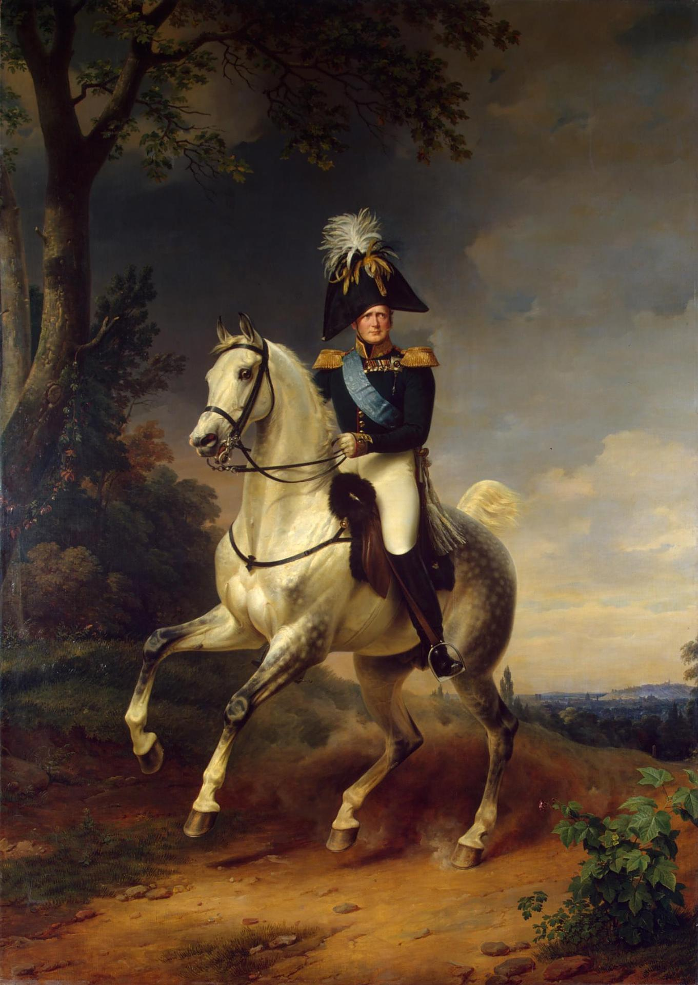 Во второй половине 1830-х гг. эта картина Ф. Крюгера заменила портрет Александра I, исполненный для Военной галереи Джорджем Доу. Император изображен в общегенеральском мундире, с лентой ордена св. Андрея Первозванного, знаками ордена Подвязки (Англия) и Меча (Швеция), объединенными звездой ордена св. Андрея Первозванного, знаком ордена св. Георгия 4-й степени, медалью "В память Отечественной войны" (Россия) и знаками иностранных орденов. Император представлен на фоне Парижа, верхом на лошади Эклипс, подаренной ему Наполеоном в 1808 г. в Эрфурте. На этой лошади Александр въехал в Париж в 1814 г.